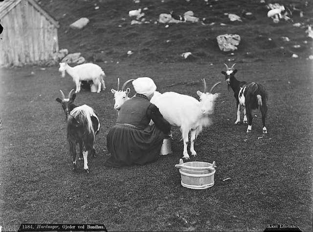 Mjølking av geiter i Bondhusdalen i Kvinnherad